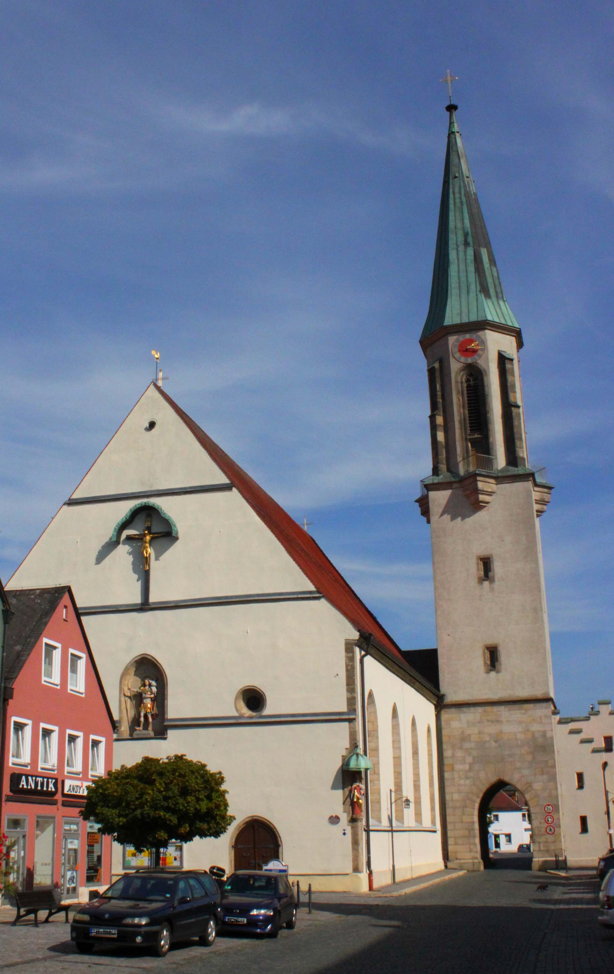 Die Pfarrkirche Mariä Himmelfahrt ist spätgotische Hallenkirche mit barockem Innenausstattung